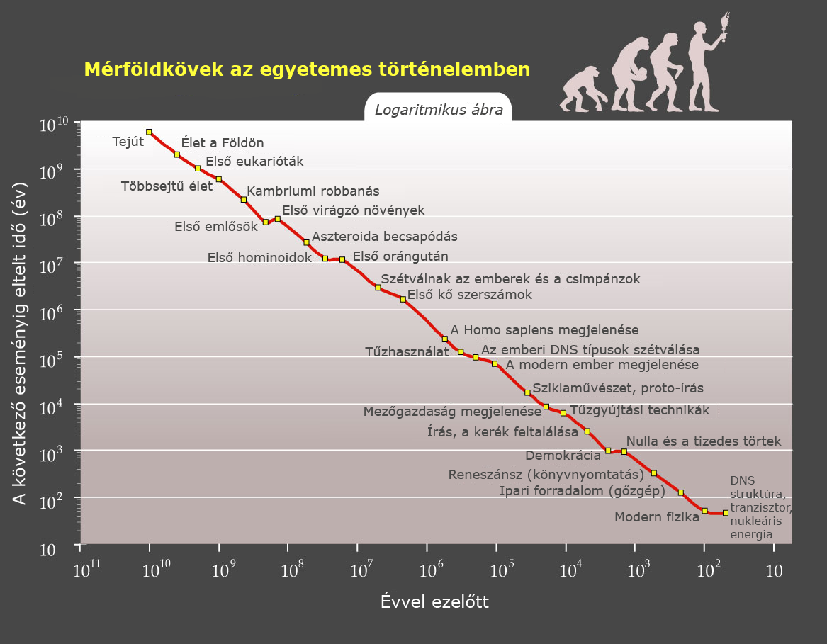 Mérföldkövek az egyetemes történelemben logaritmikus skálán